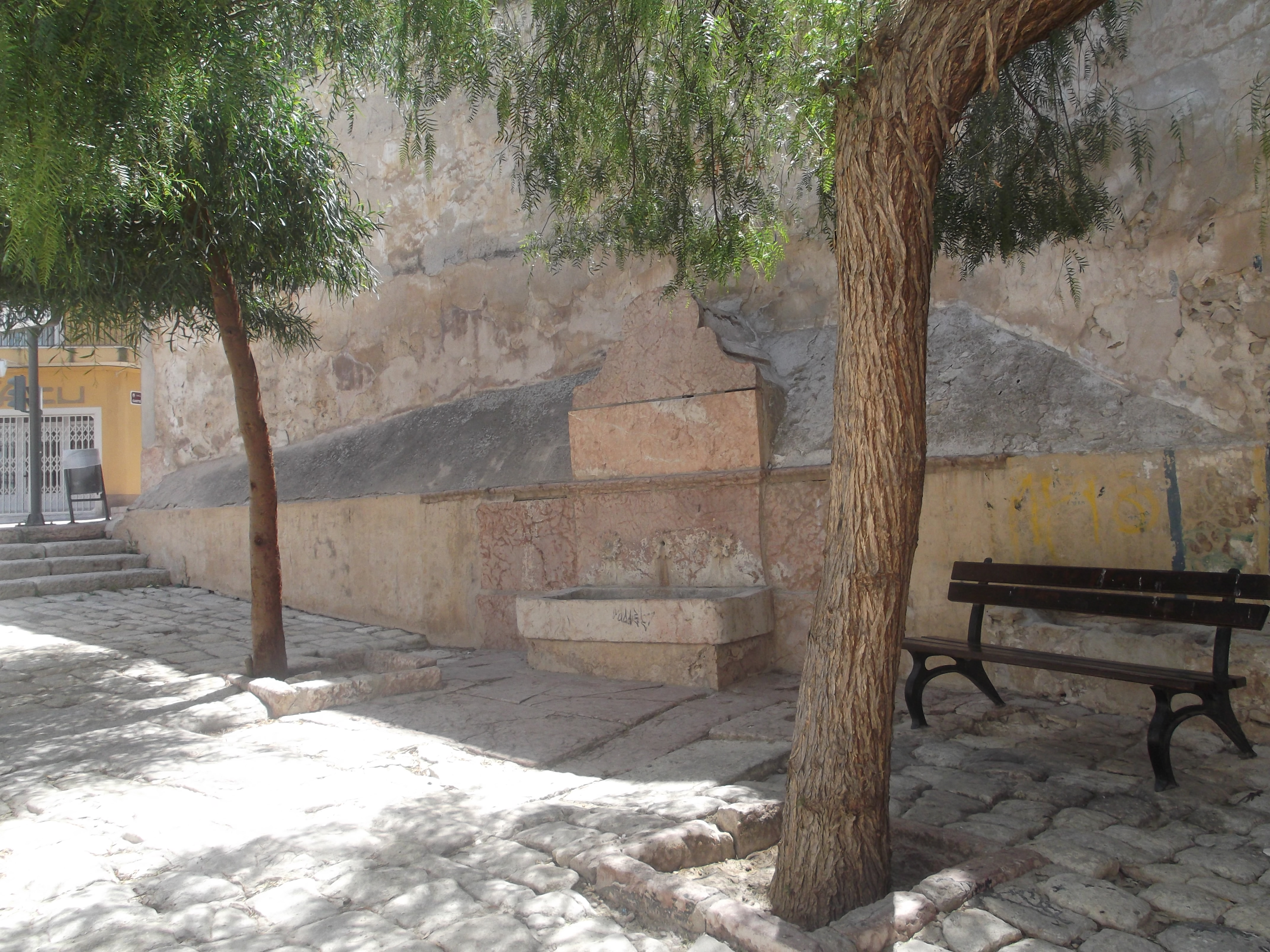 Fuente "La Peña". Original del s. XIX. Aspe (Alicante).